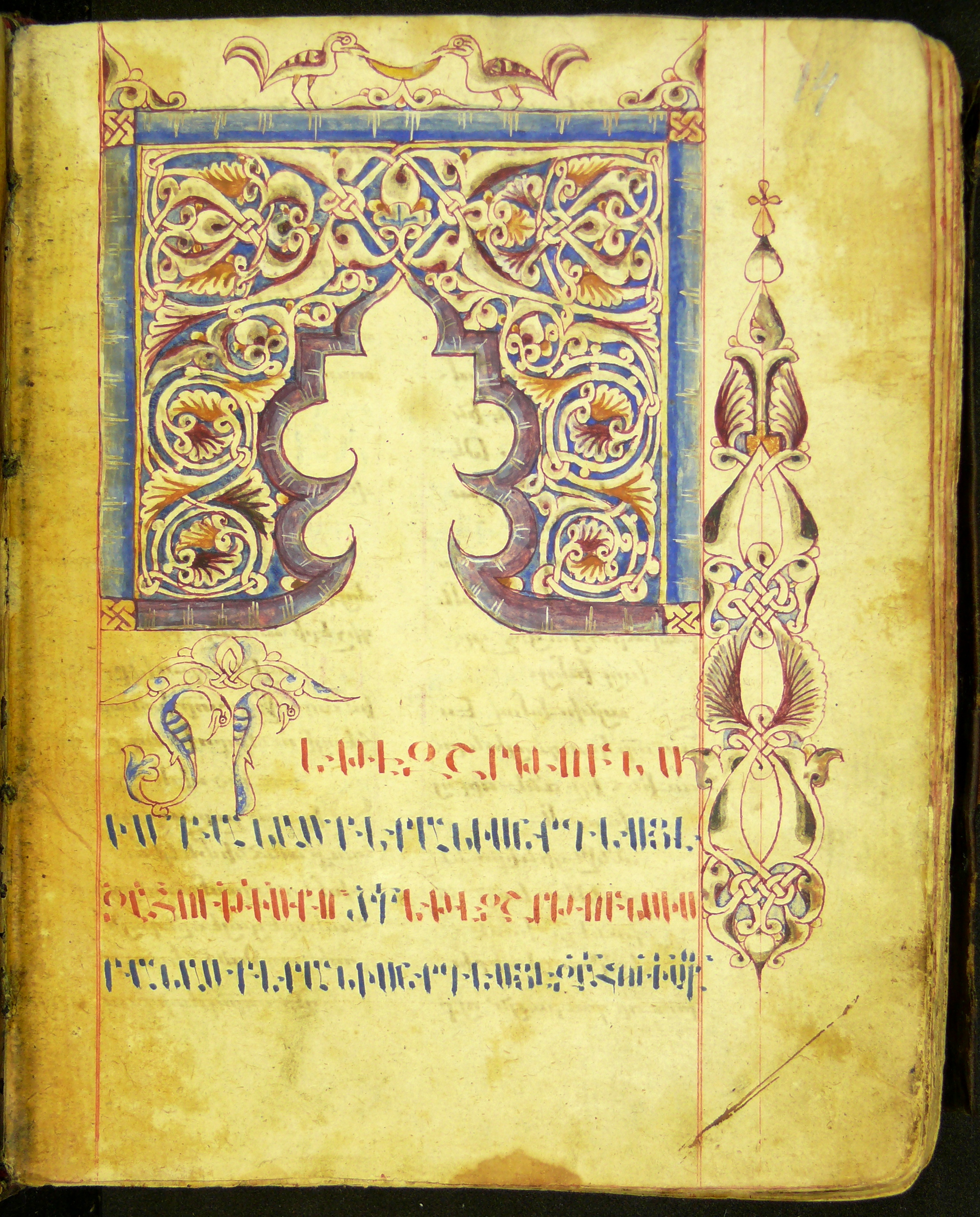 Կիսախորան, Երևան, 1625 թ. ՄՄ 507-14ա